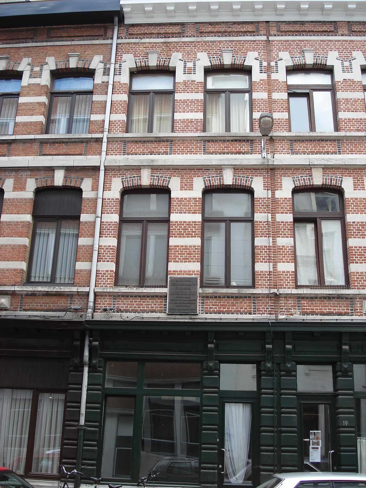 Geboortehuis maison natale Lode Zielens Pompstraat Anvers Antwerpen